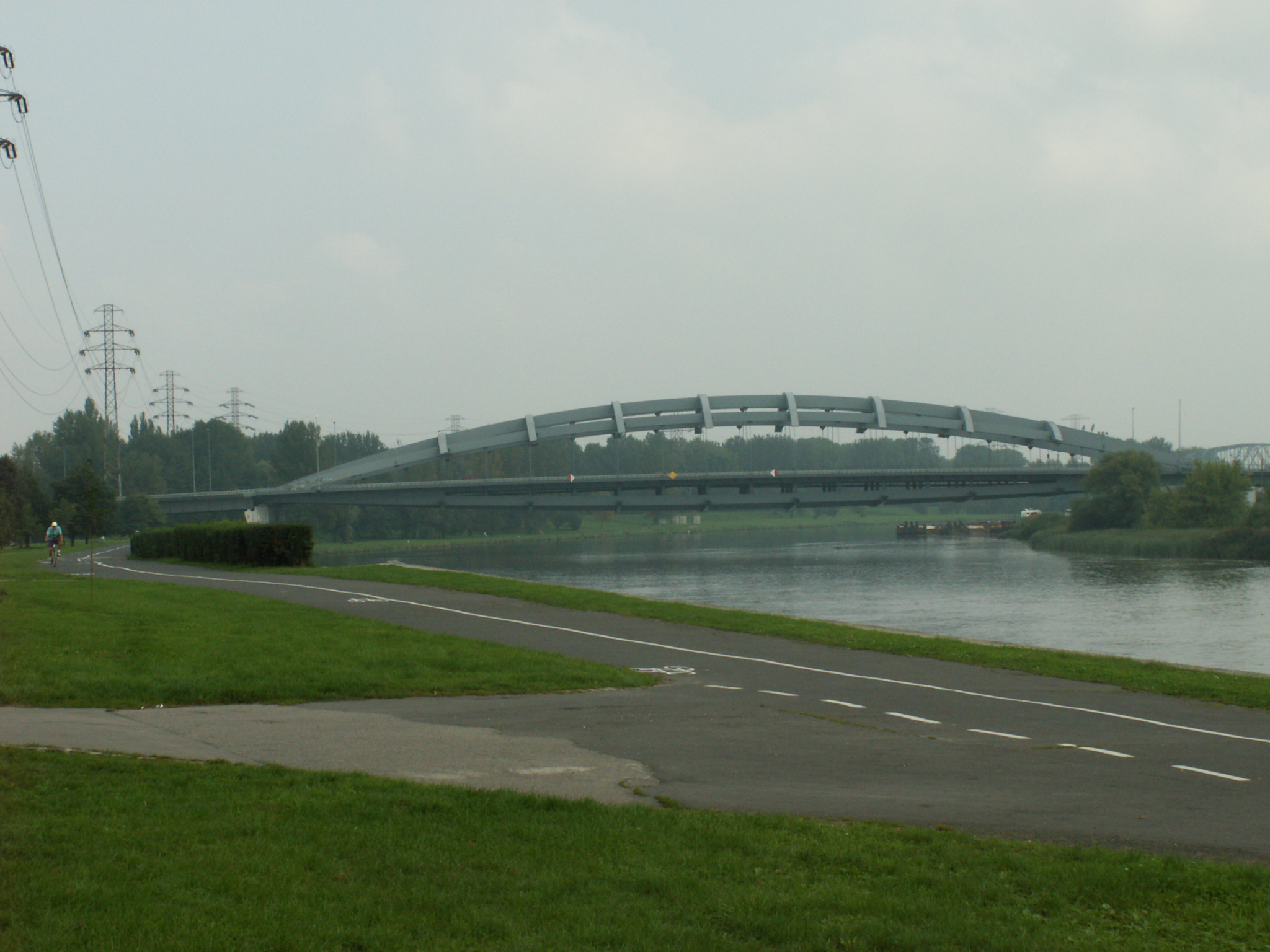 Most Kotlarski Kraków, autor: macieias